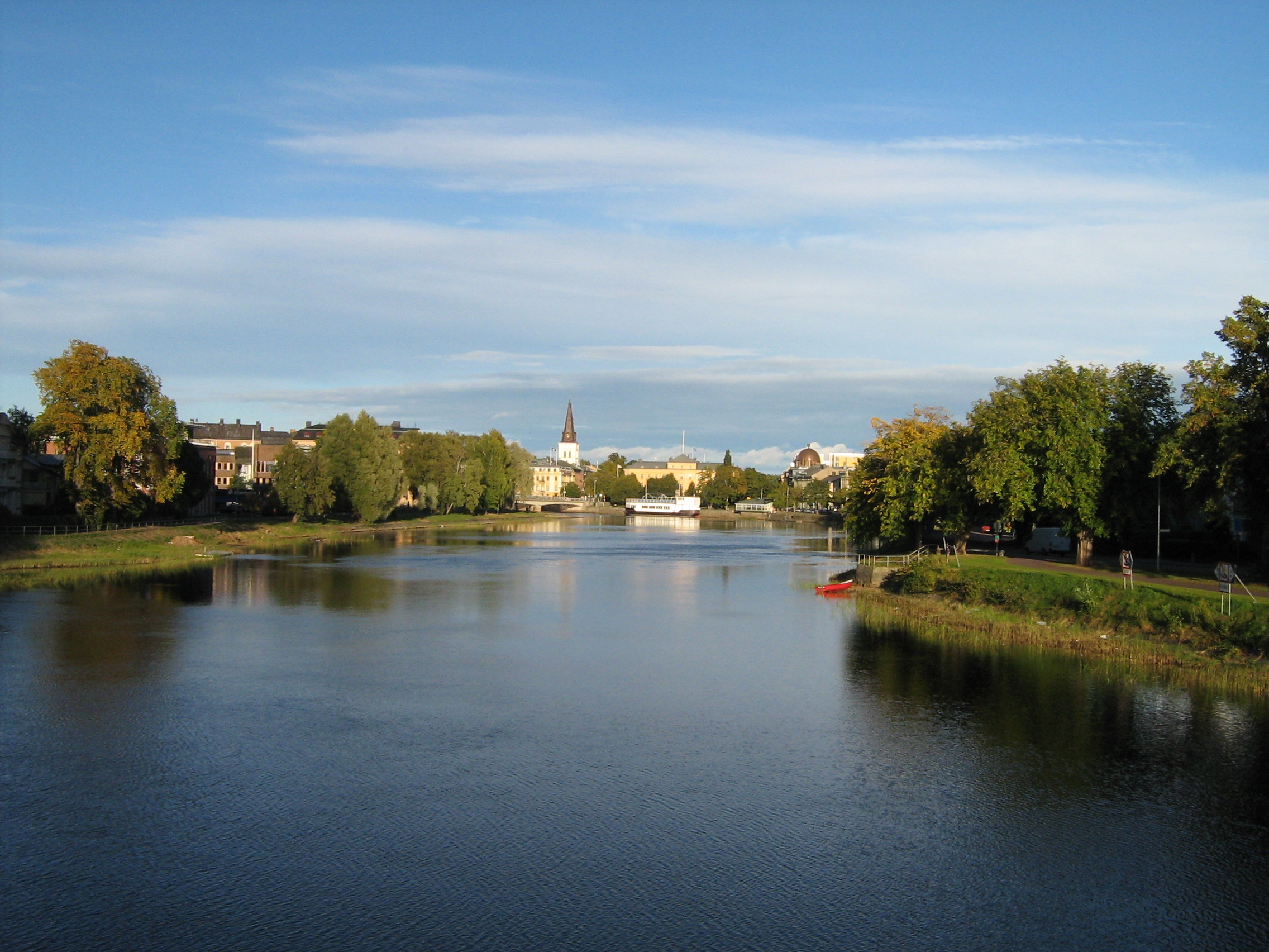 Karlstad centrum sedd från Klaraborgsbron.